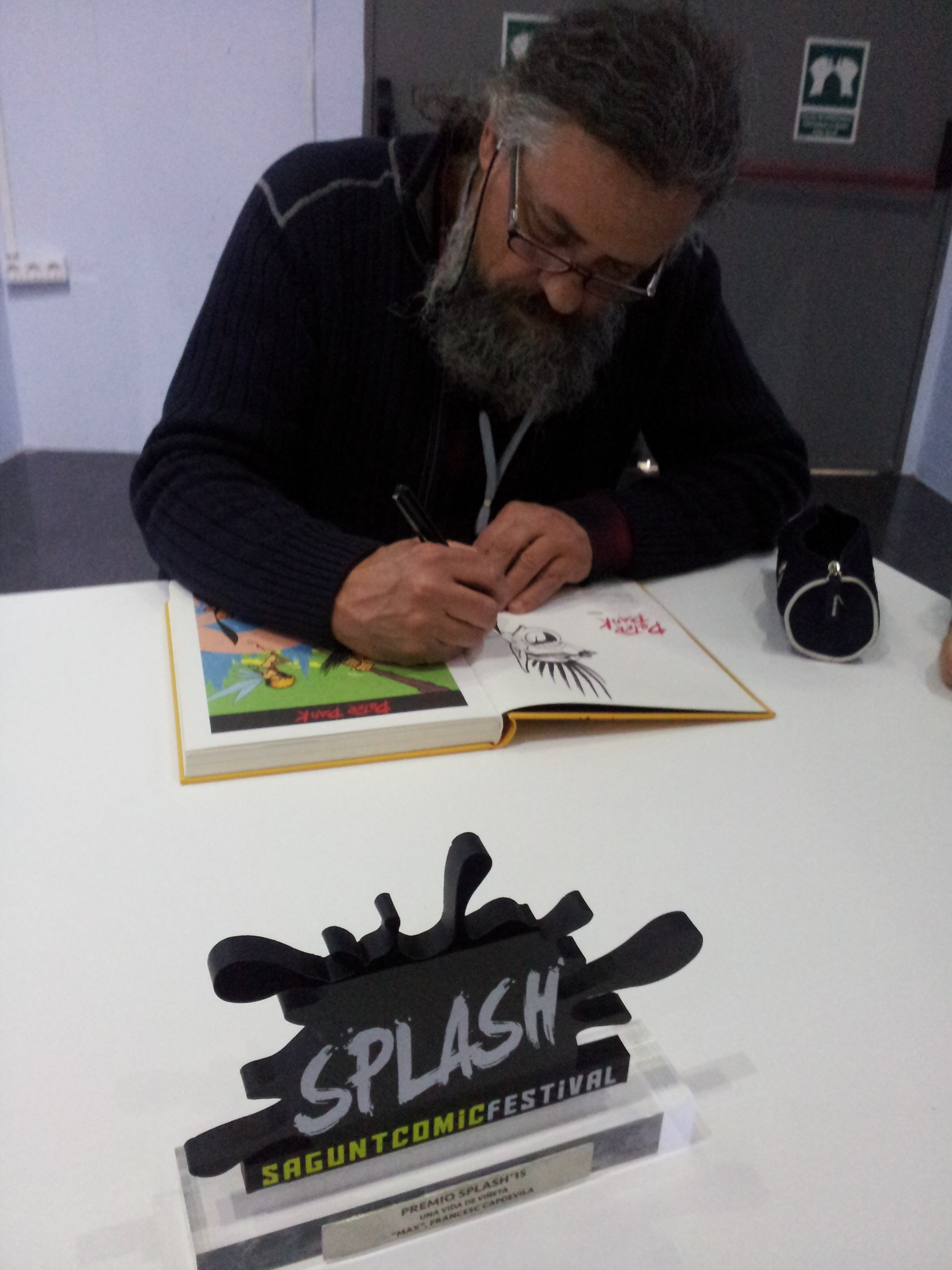 Festival de còmic Splash Sagunt 2015.